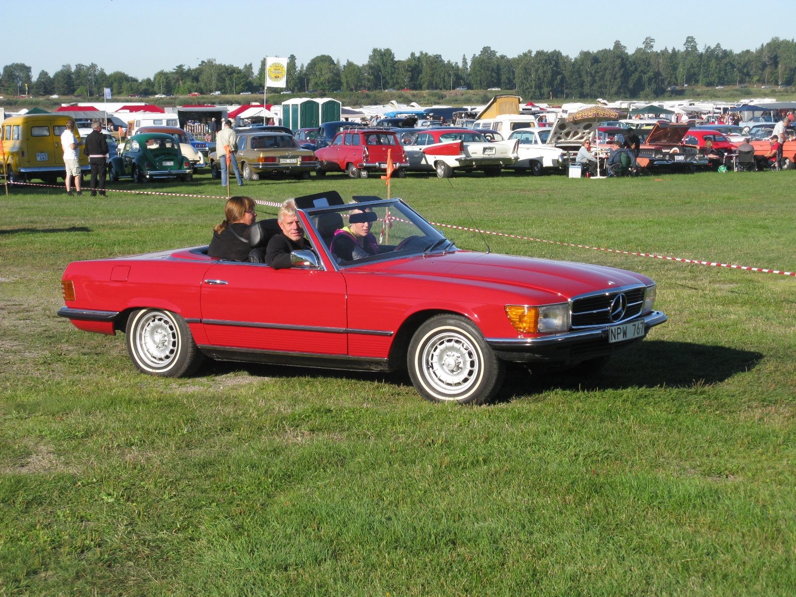 Mercedes-Benz 350 SL R107